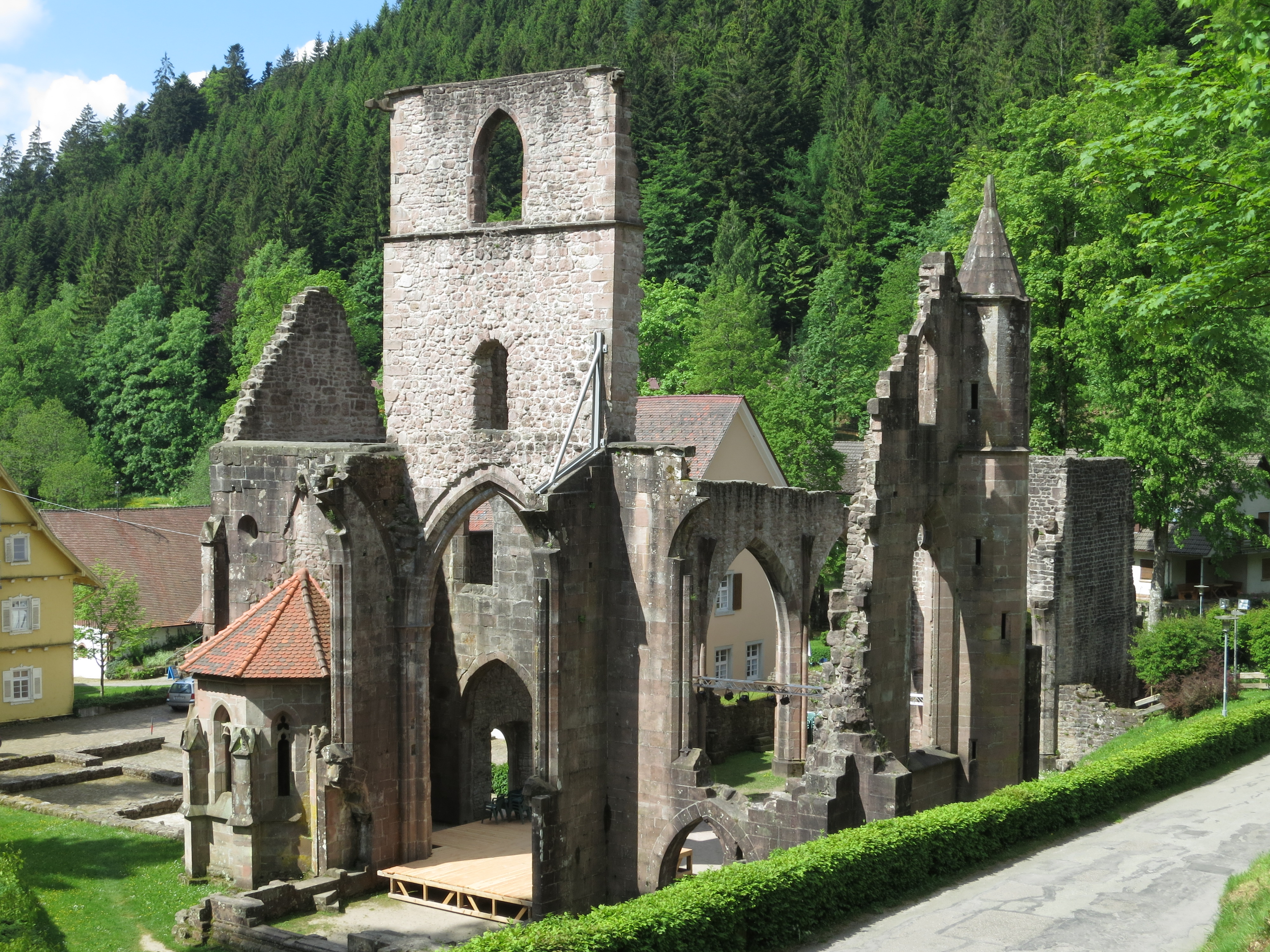 Ruine der Klosterkirche des ehemaligen Klosters Allerheiligen bei Oppenau im Schwarzwald.